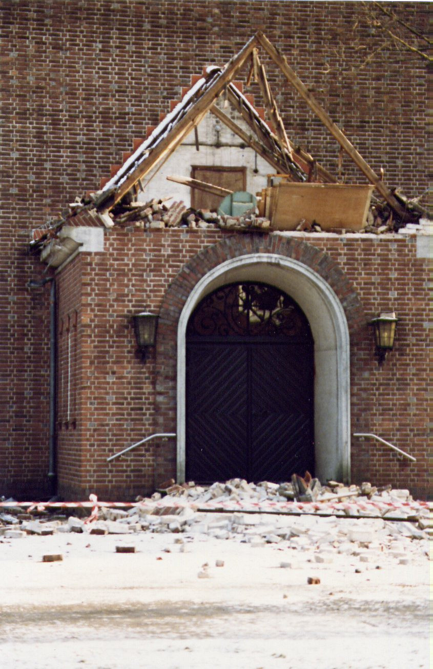 der Vorbau des westlichen Kircheneingangs in Trümmern Michaelkirche (Faßberg)